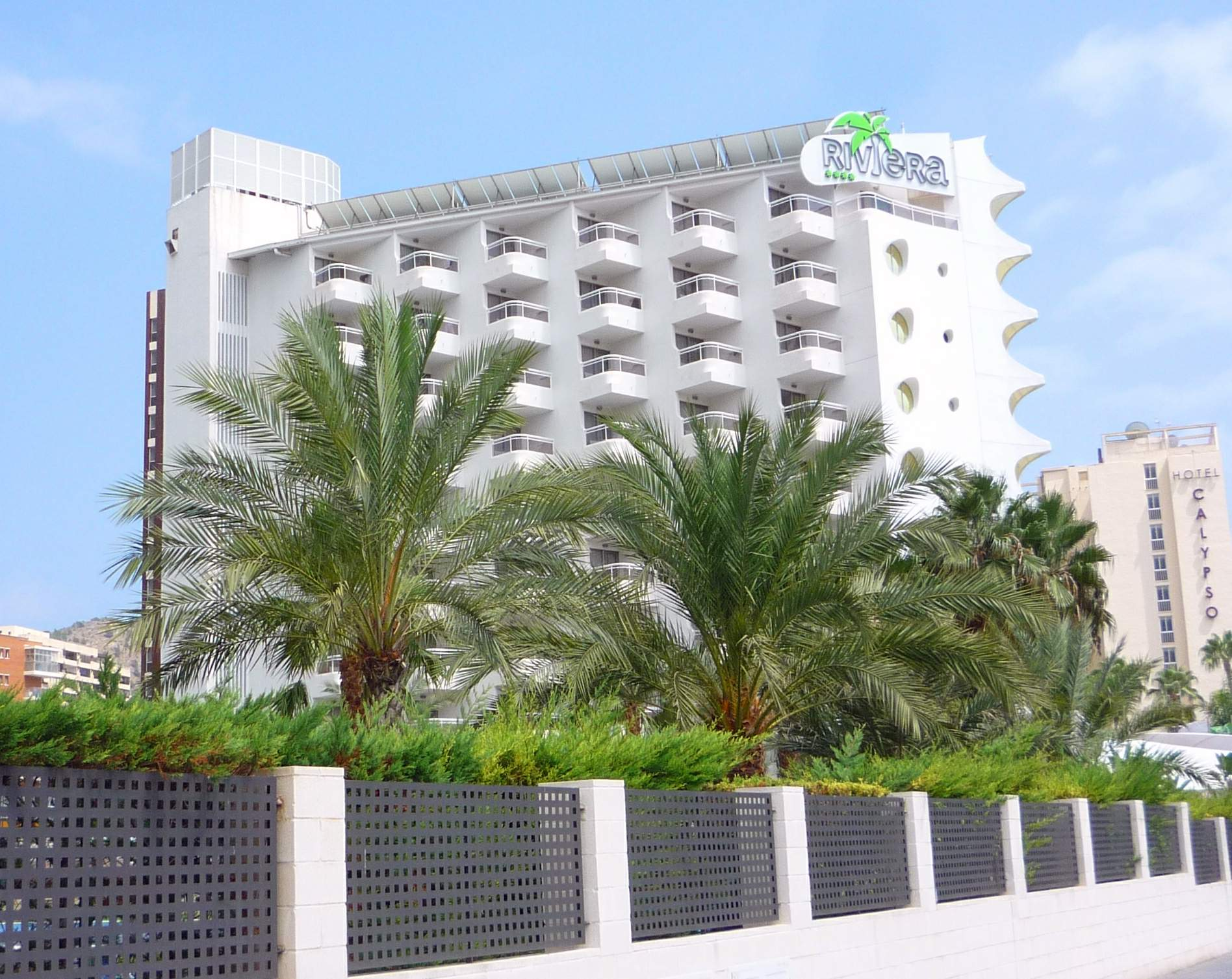 Benidorm - Riviera Beachotel